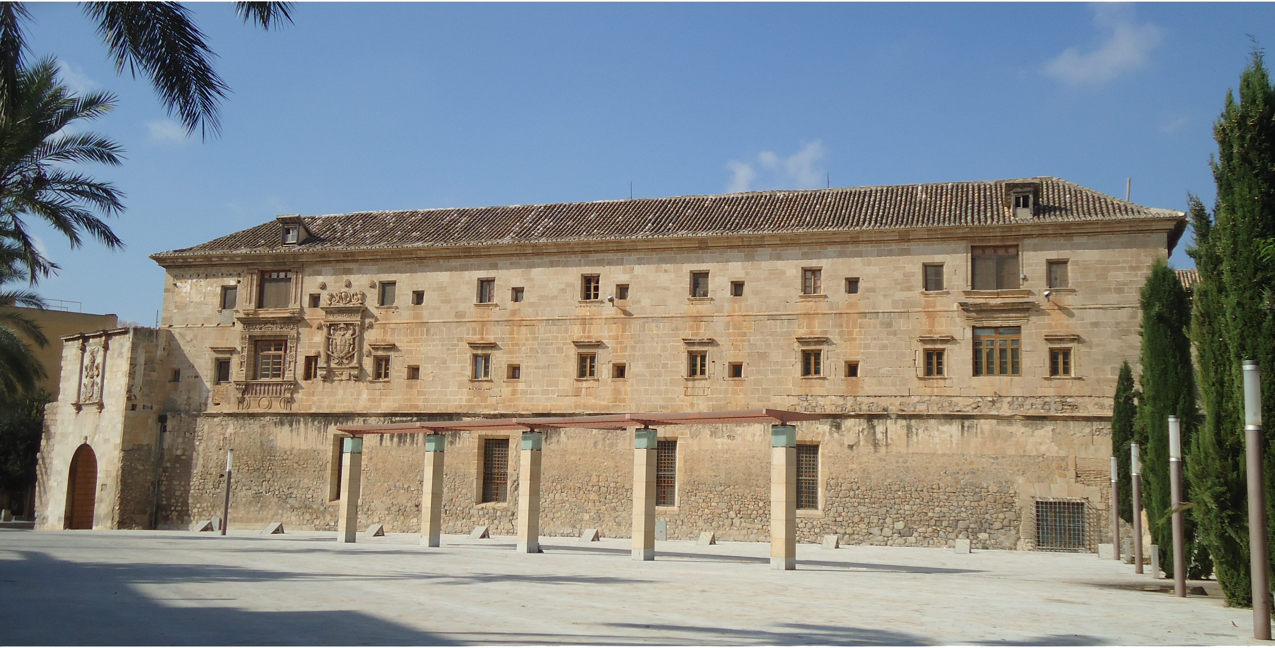 Façana lateral del Colegi de Santo Domingo, Oriola.